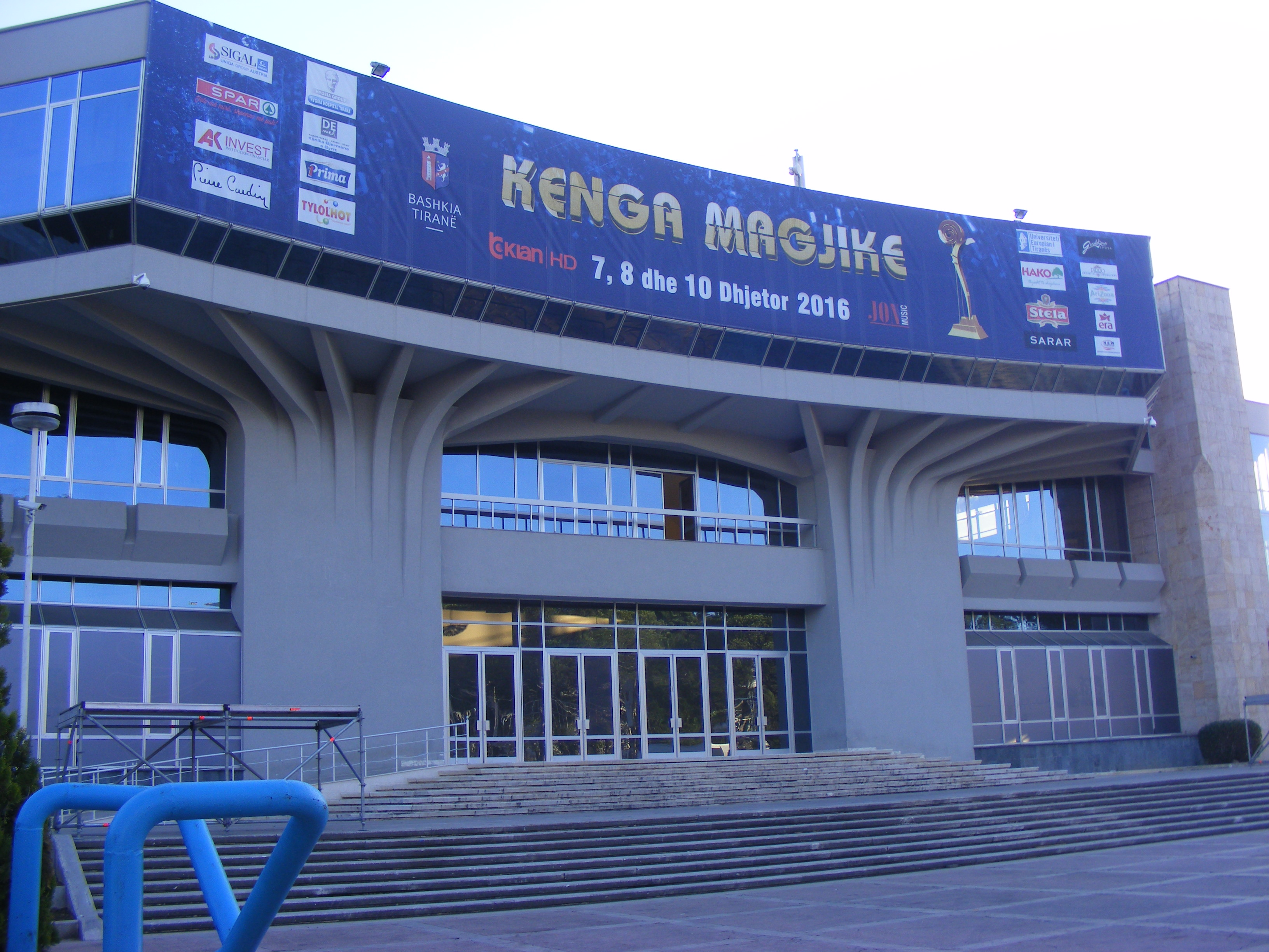 Pallati i Kongreseve,Tiranë